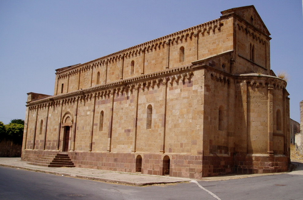 Ex Cattedrale di Santa Maria di Tratalìas